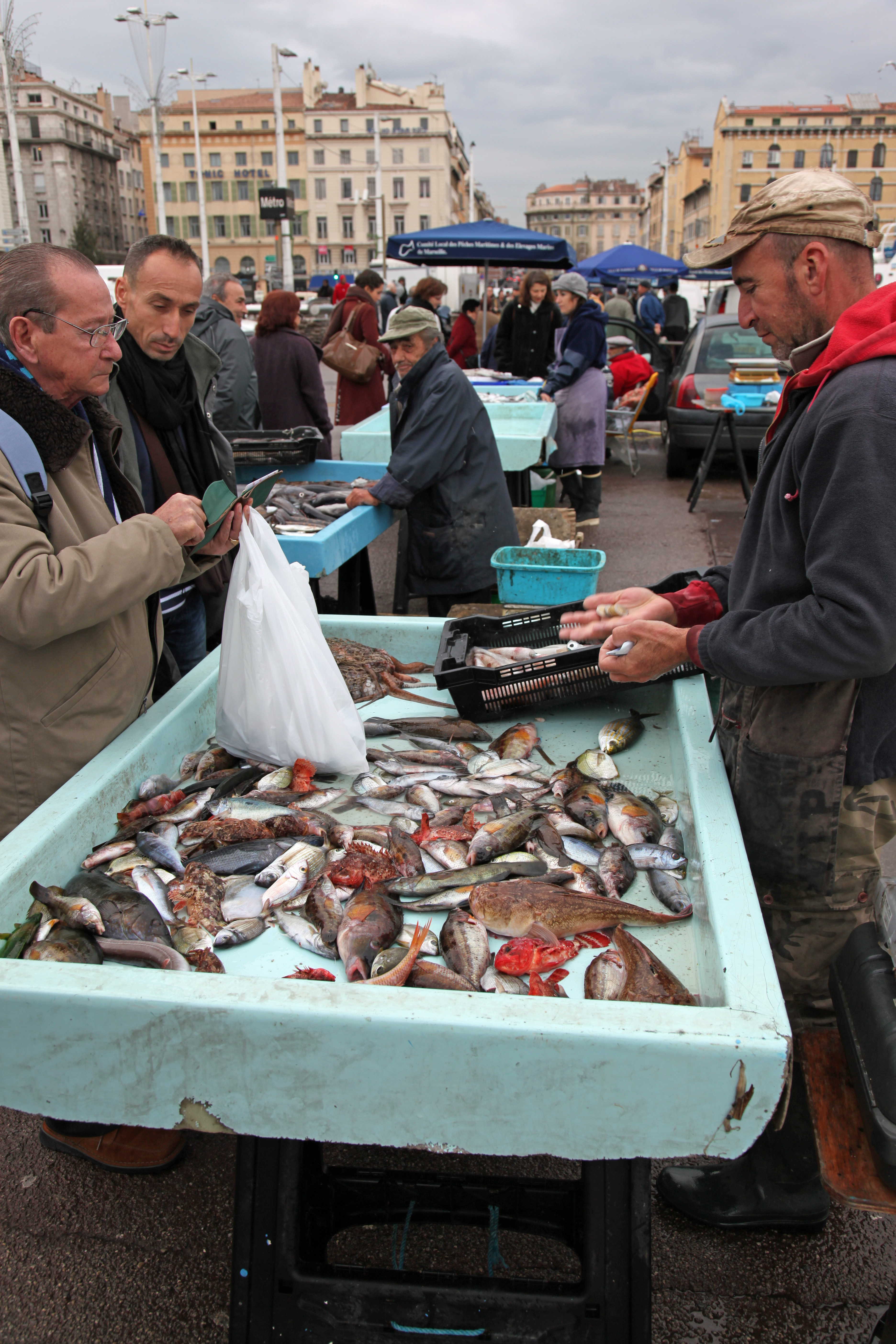 Vieux-Port de Marseille, poissons pour la bouillabaisse